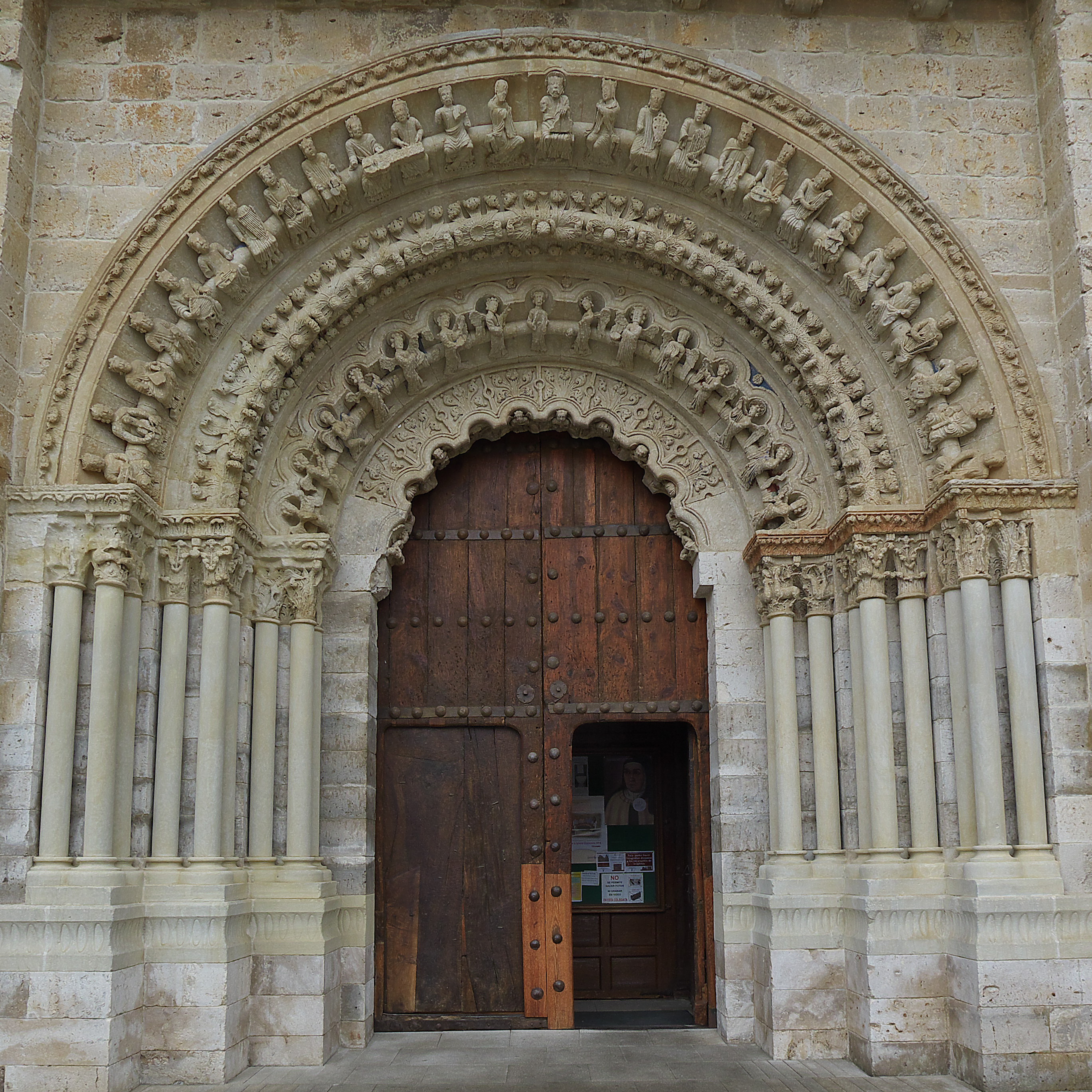 Portada del siglo XII con cuatro valiosas arquivoltas. Existe, por parte de los investigadores, dificultad para clasificarla en cuanto a su filiación estilística, optando por la labor de un maestro conocedor del arte románico gallego